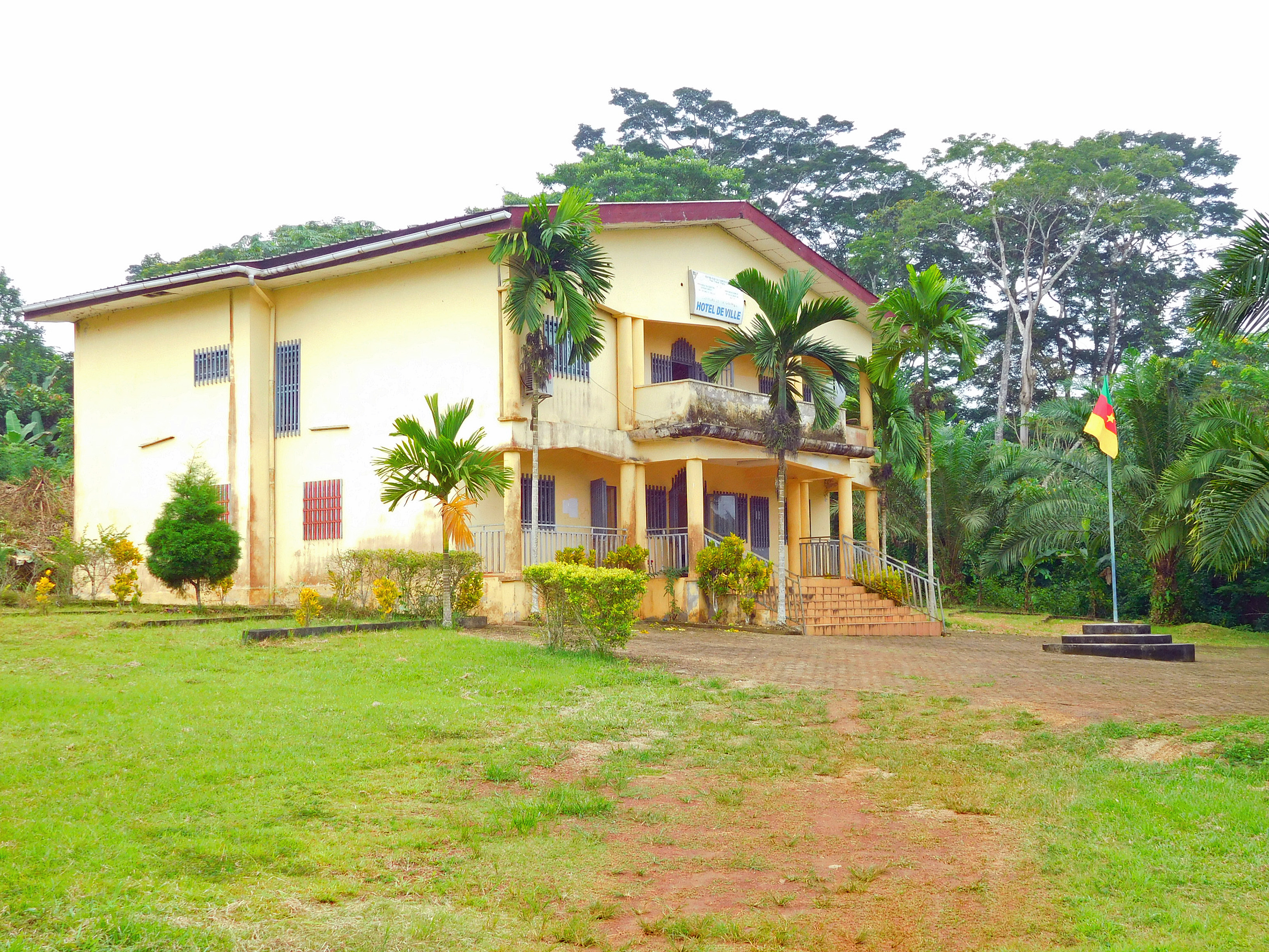 Hôtel de ville de Ngog-Mapubi (Cameroun).